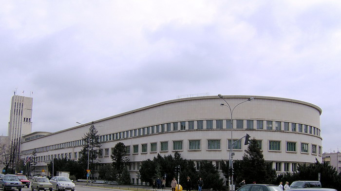 Budova Nejvyšší rady Vojvodiny v Novém Sadu, vybudovaná v roce 1939 podle projektu Dragišy Brašnovana, Vojvodina, Srbsko